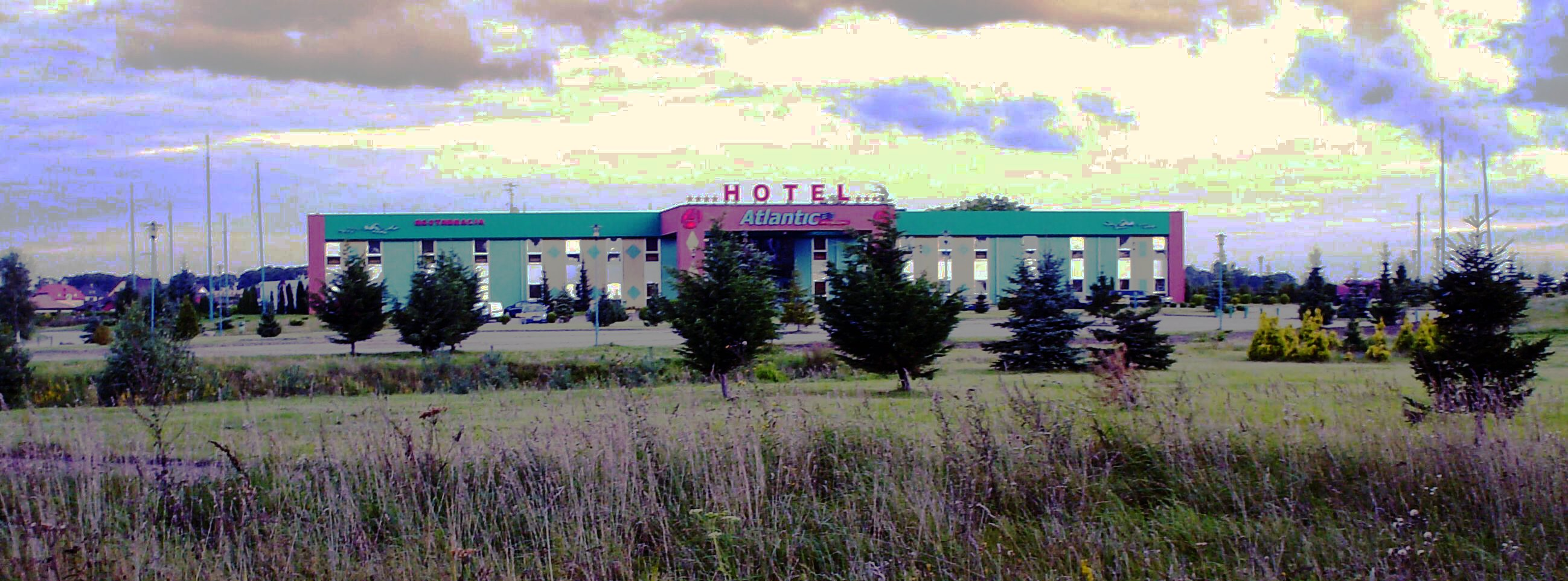 Nowe Bielice przy DK6.